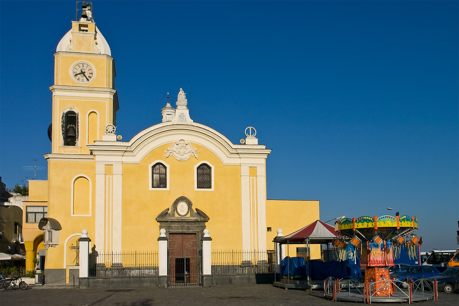 Procida, chiesa di Santa Maria della Pietà e San Giovanni Battista.